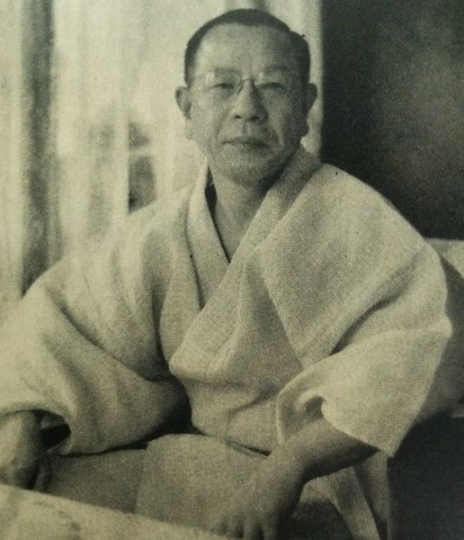 野間繁